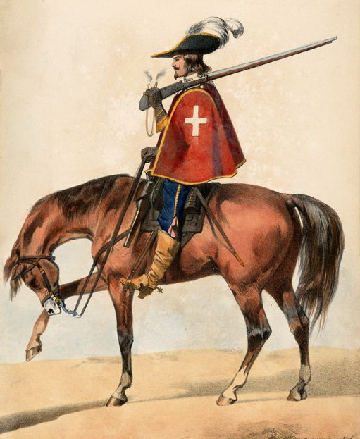 Гвардеец кардинала Ришелье